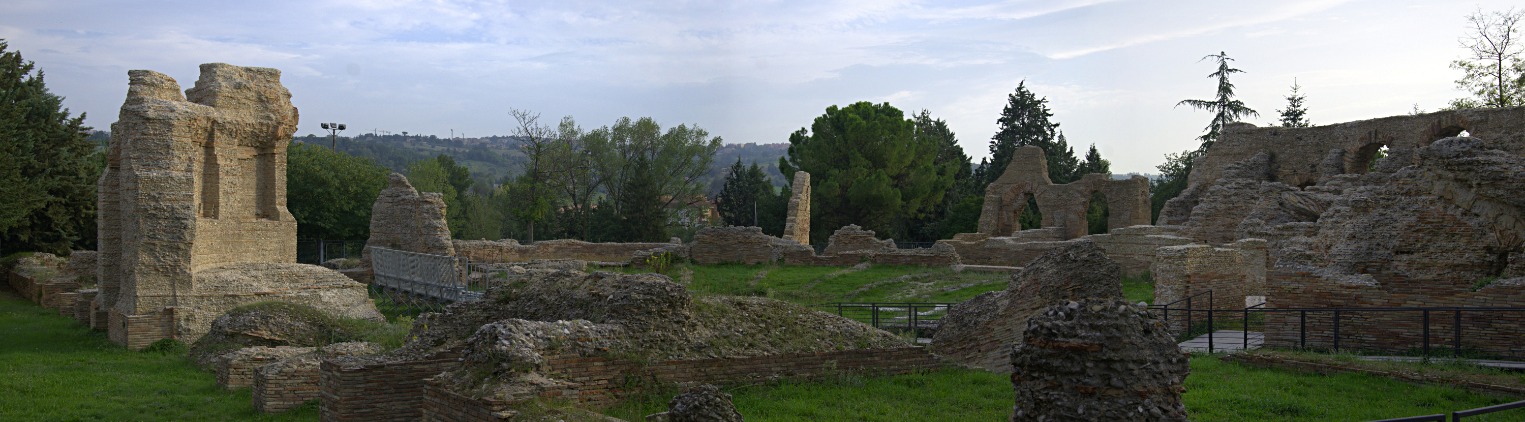 Teatro Romano di "Helvia Recina" - MIBAC This is a photo of a monument which is part of cultural heritage of Italy.